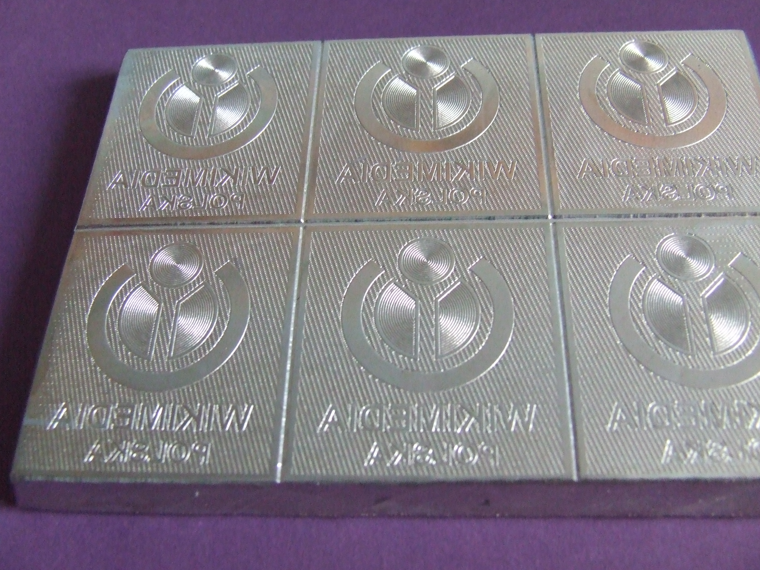 magnesium structural die; magnezowa matryca strukturalna